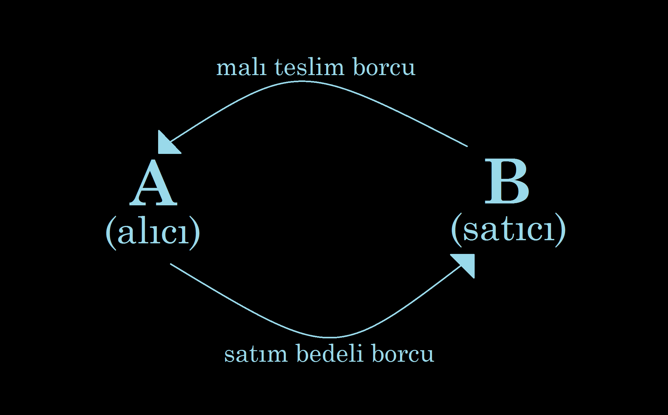 Satış sözleşmesi örneğinde borç ilişkilerini anlatan bir şema